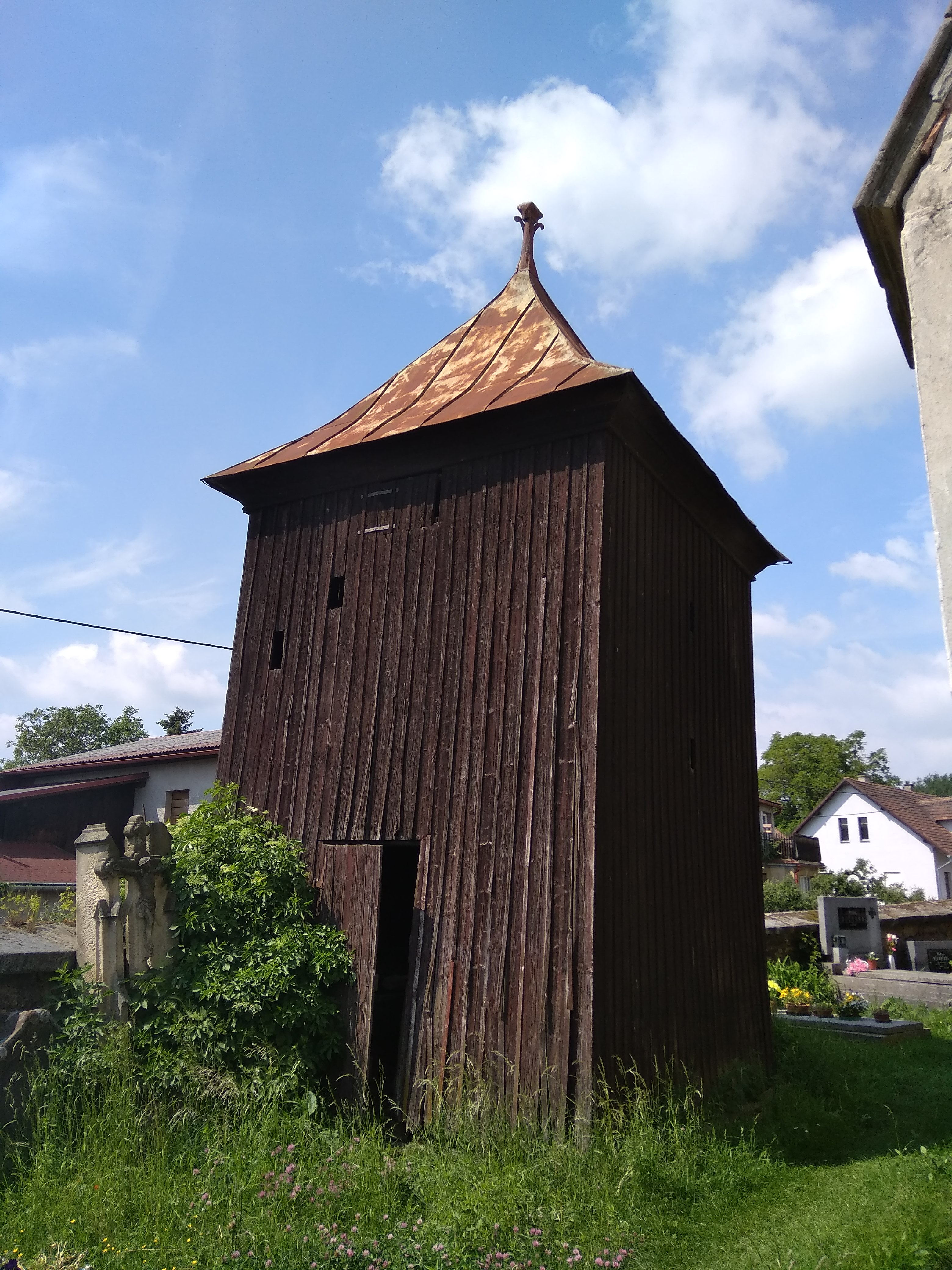 Kostel sv. Prokopa (Nadslav)